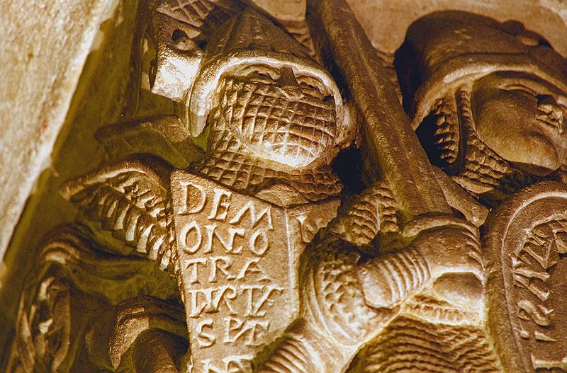 Dormition, Chapîteau de Notre-Dame du Port